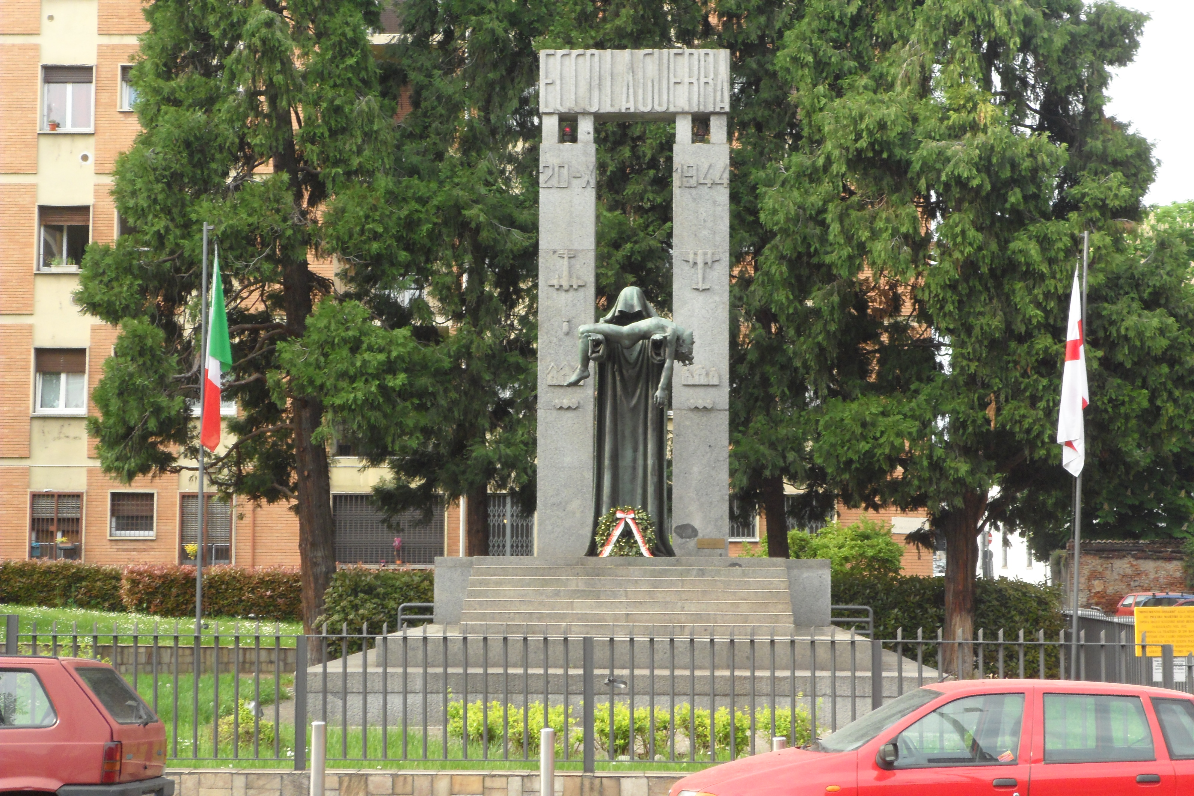 Piazza Piccoli Martiri monumento alla vittime del bombardamento aereo 20 ottobre 1944 This is a photo of a monument which is part of cultural heritage of Italy.